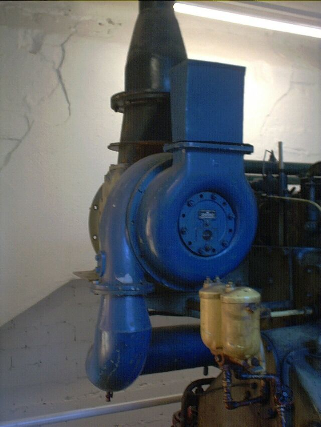 Turbolader von einem Schiffsdiesel